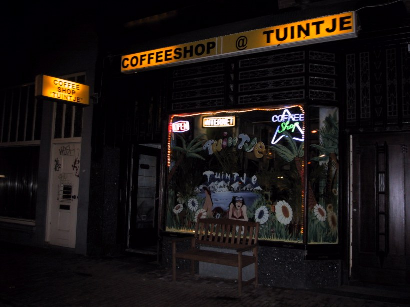 Me - 20/11/2005 - Amsterdam - Coffeeshop - Overtoom